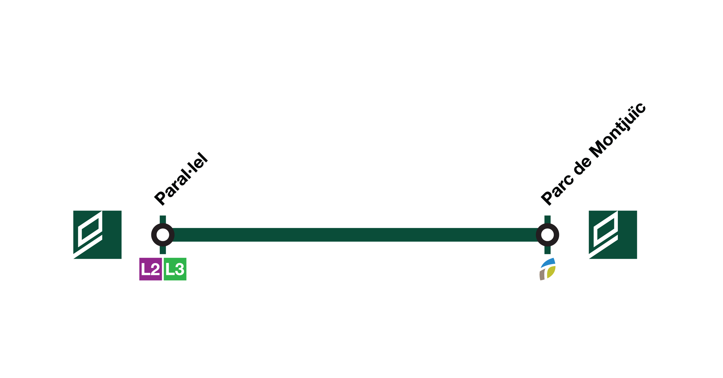 Termómetro del Funicular de Montjuïc